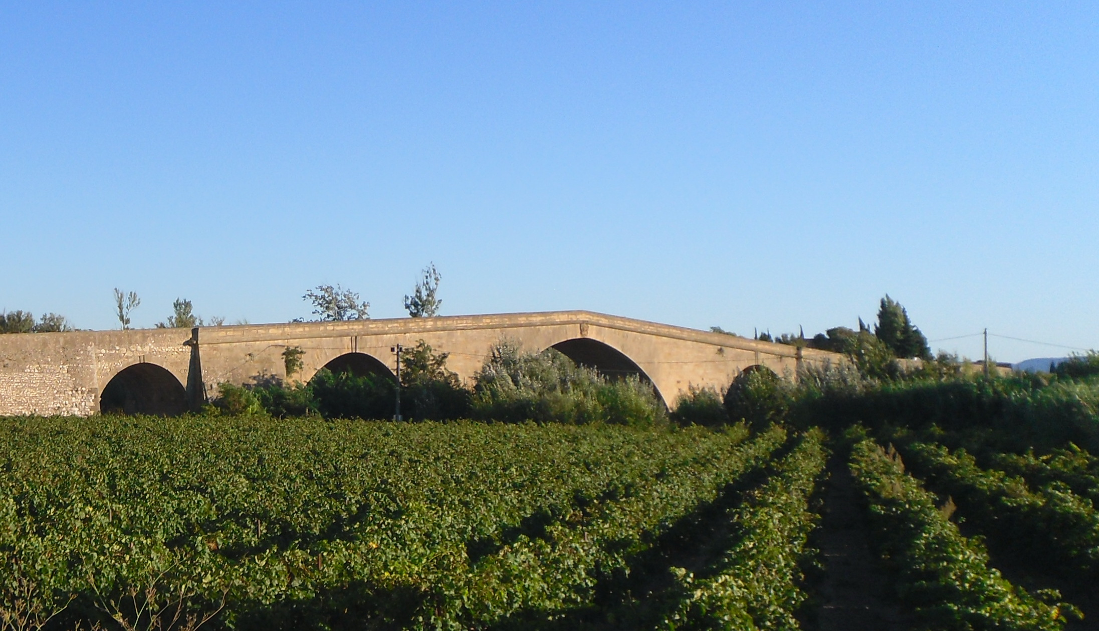 Pont des Etats du Languedoc sur l'Orbieu à Ornaisons